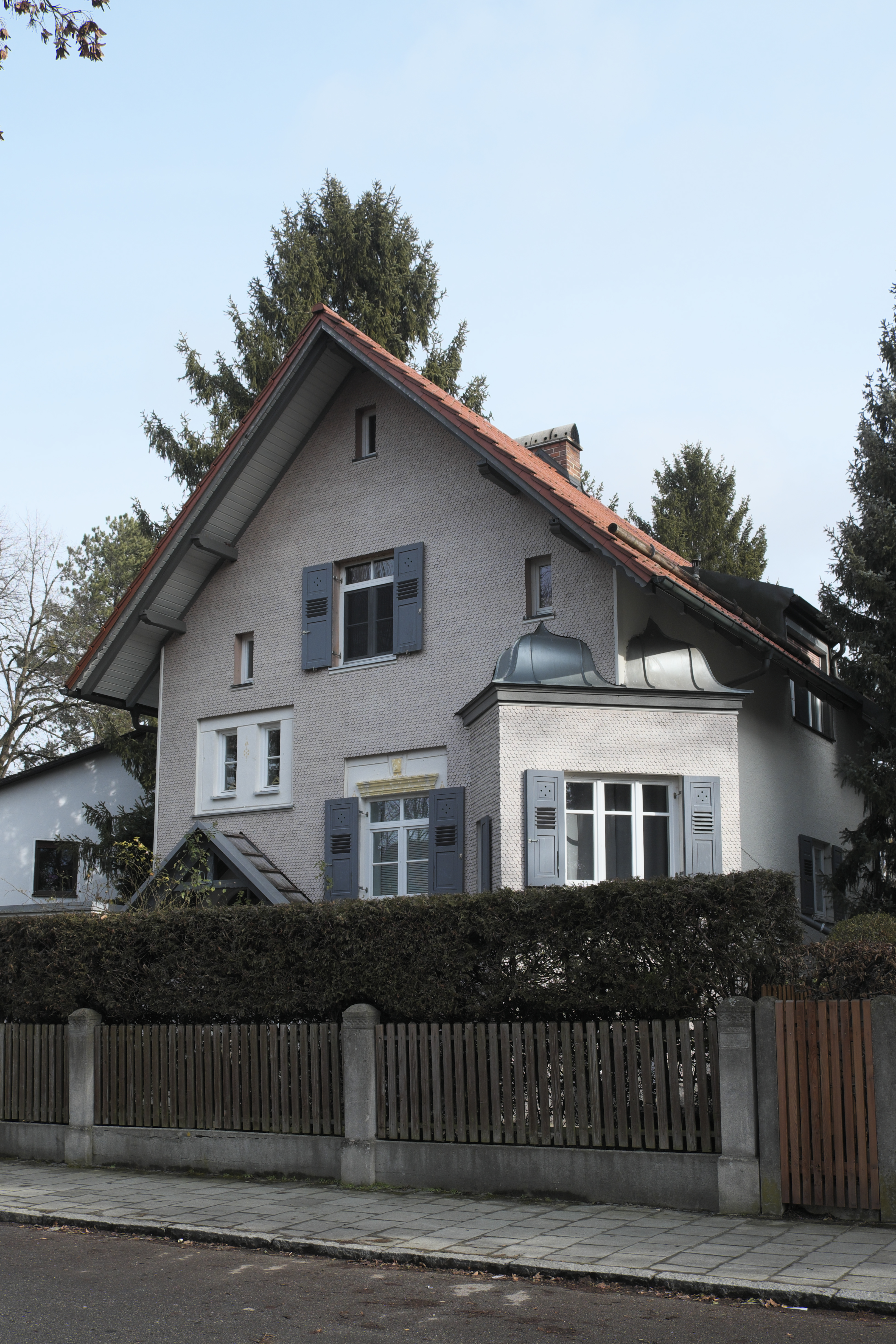 Villa in der Oselstraße 40 in Obermenzing im Stadtbezirk Pasing-Obermenzing in München (Bayern/Deutschland)